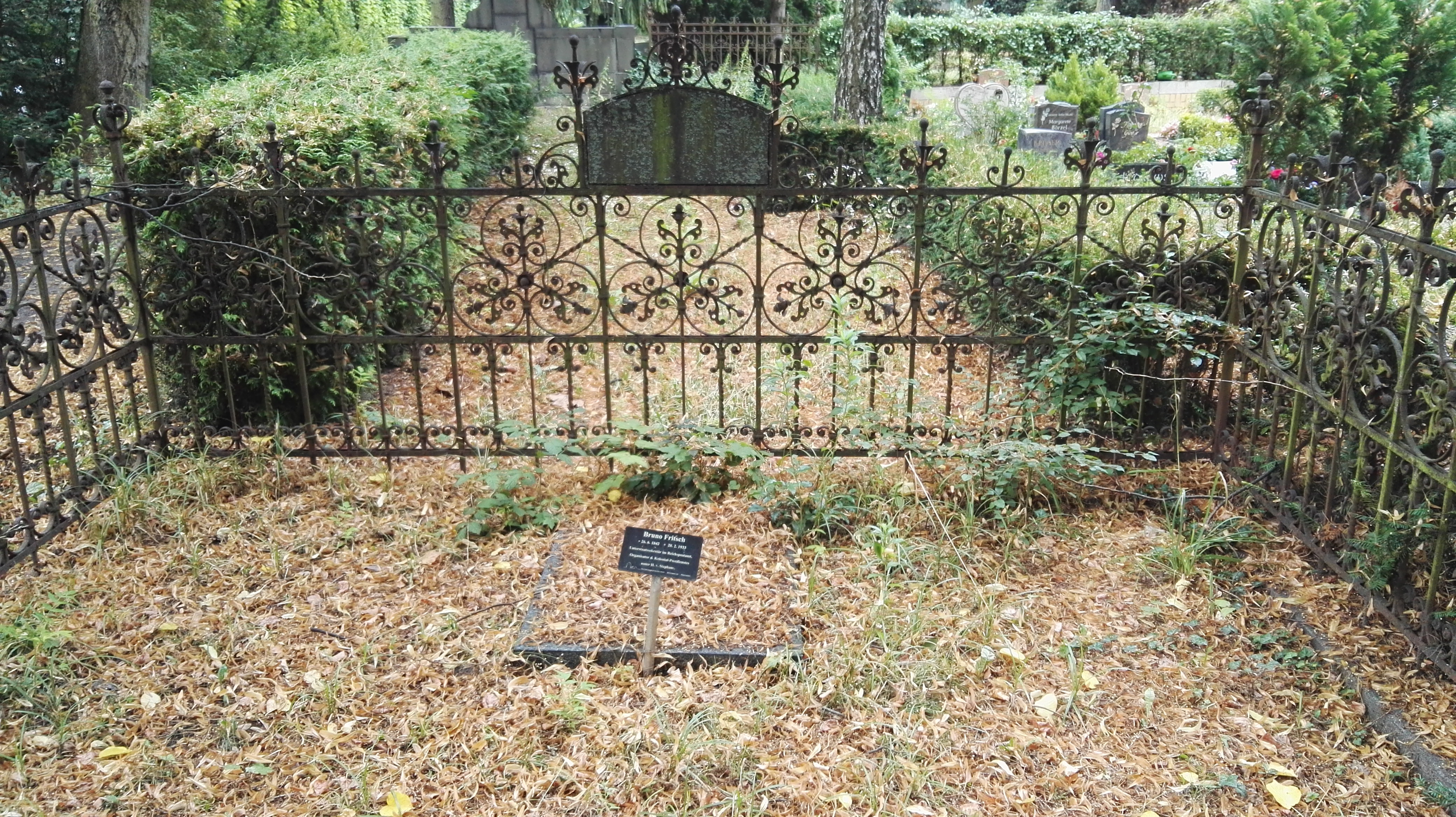 Grab für Bruno Fritsch; Politiker der Nationalliberalen Partei; auf dem Friedhof I der Dreifaltigkeitsgemeinde auf den Friedhöfen vor dem Halleschen Tor